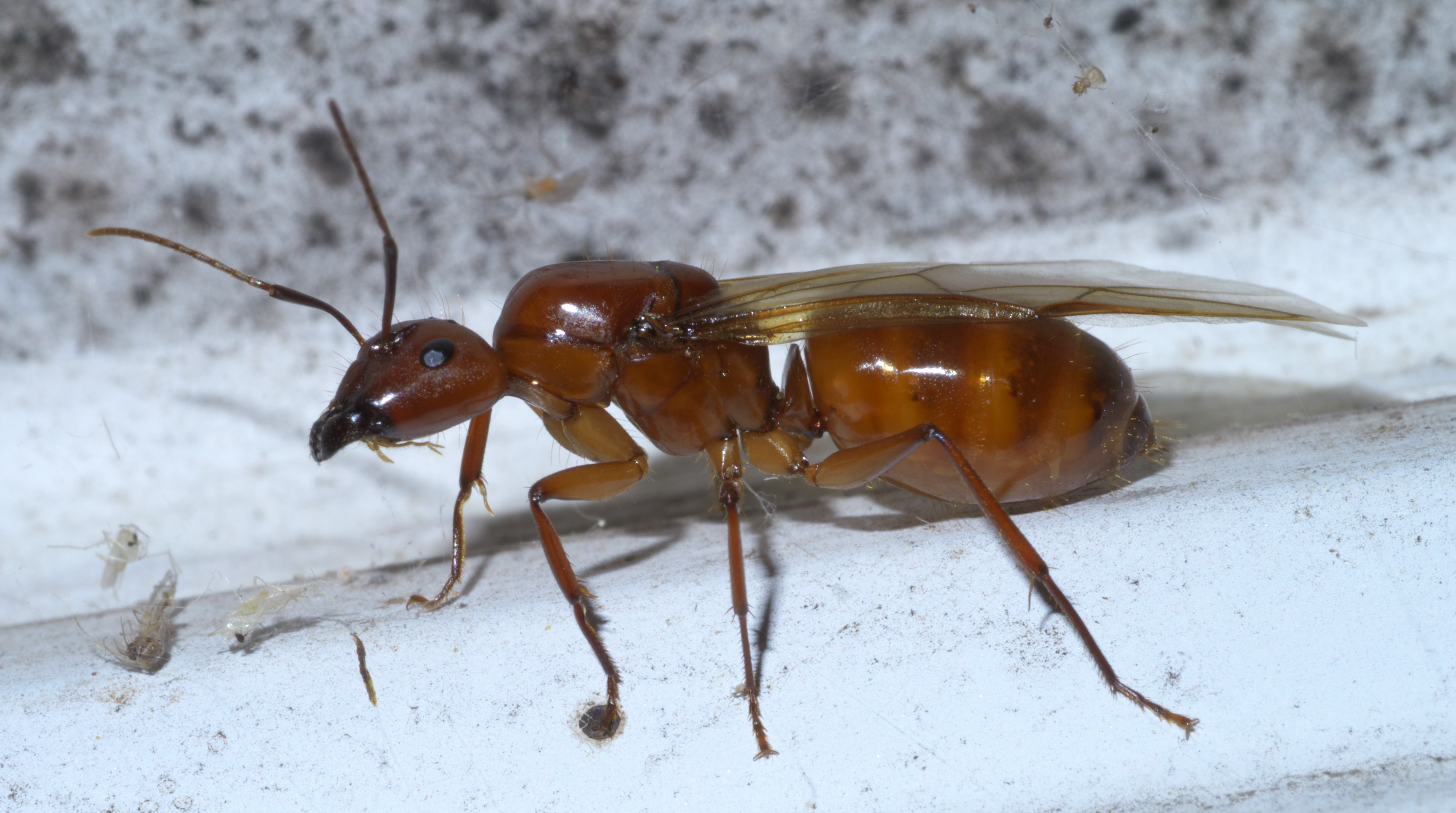 Camponotus castaneus, Genus: Carpenter Ants, ID Confidence: 98